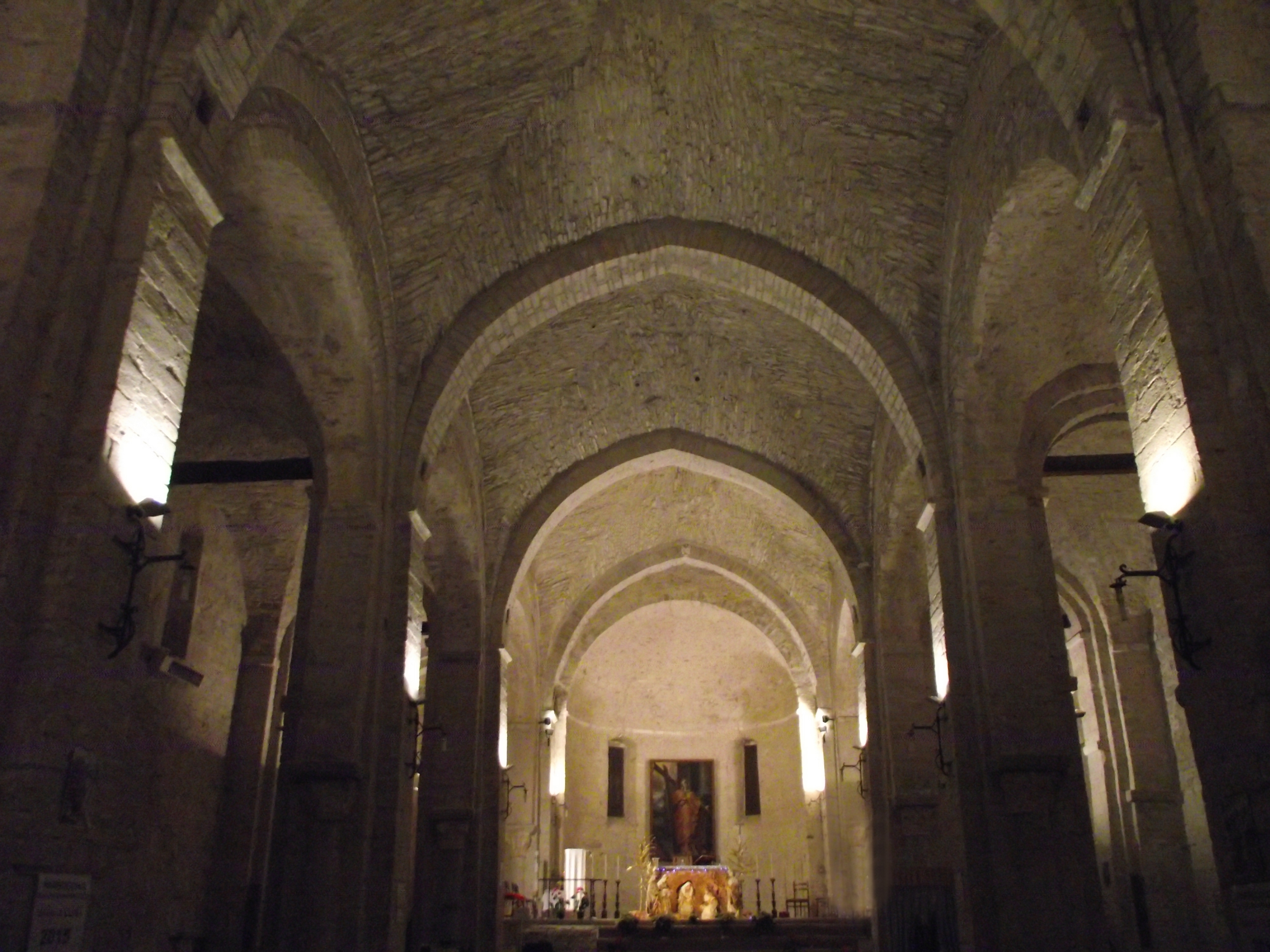 Serra San Quirico, Abbazia di Sant'Elena, 1180-1212